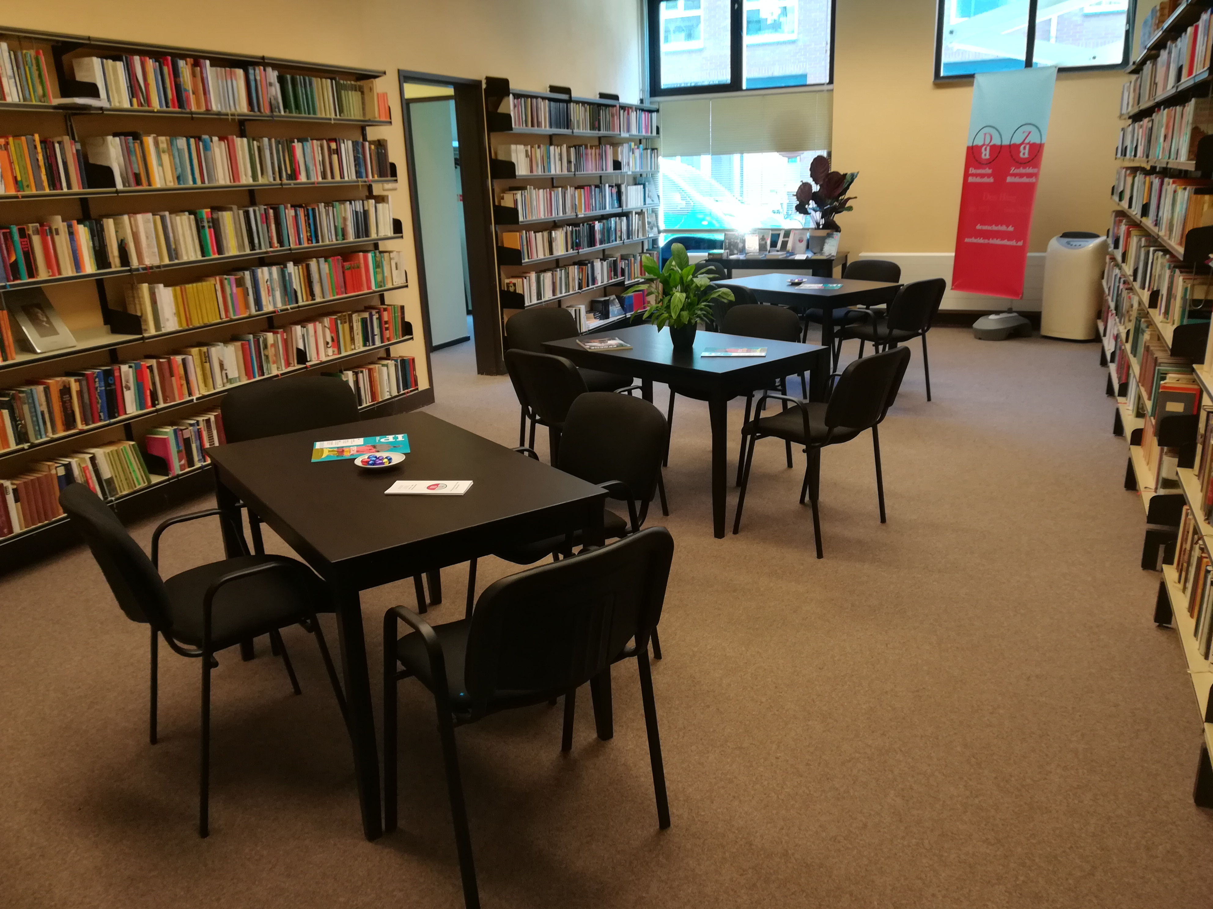 Veranstaltungs- und Filmraum